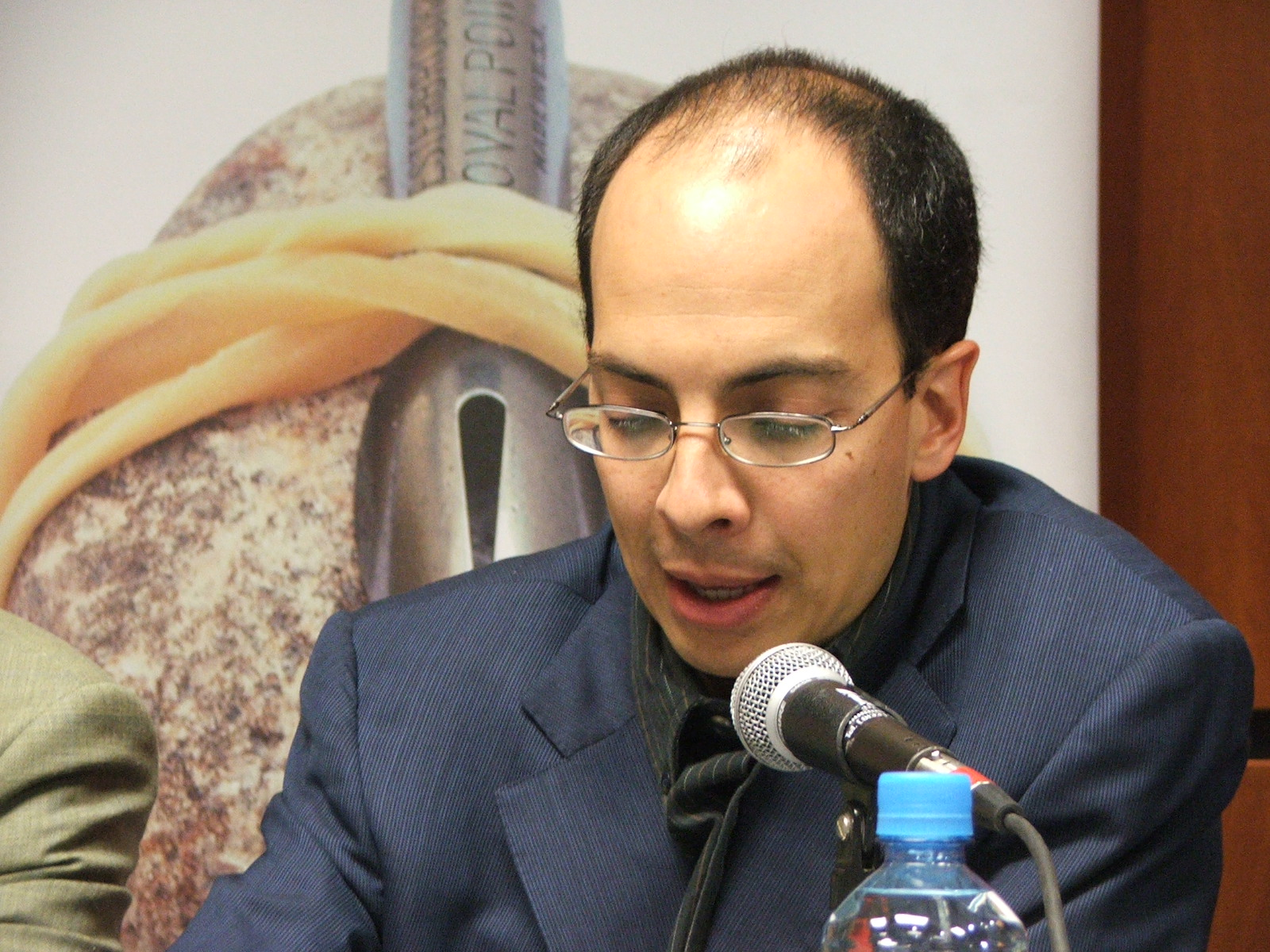 Jorge Volpi, en la Feria Internacional del Libro de Guadalajara (México) 2005.